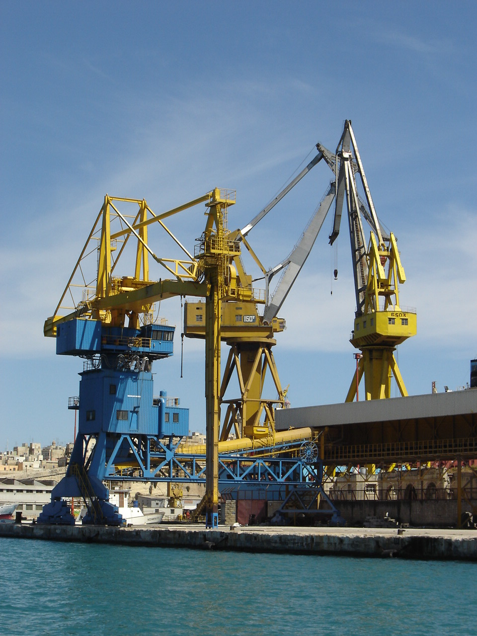 Boote und marine Anlagen, Zubehör und Details. Malta, April 2006. Elevator (Getreidesauger).